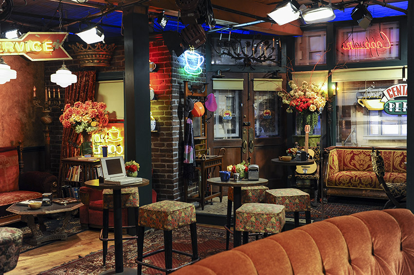 Los Angeles 2012